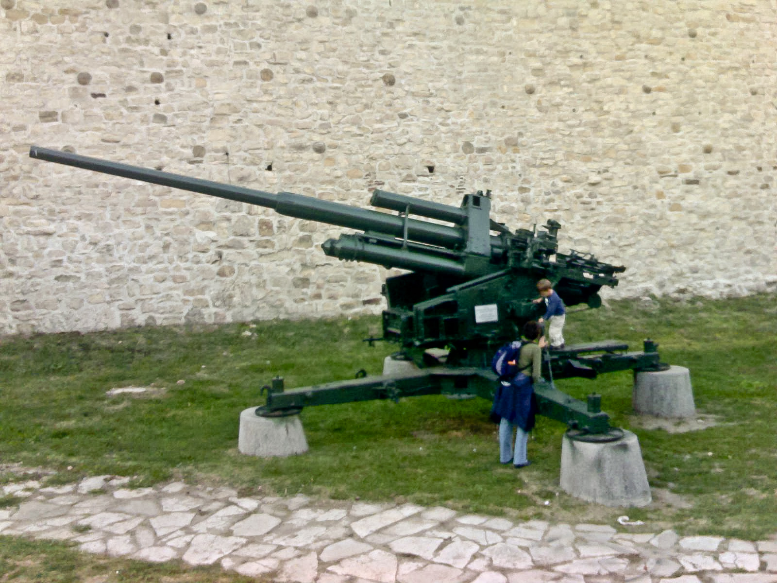 ФлаК 38 105мм на Калемегдану